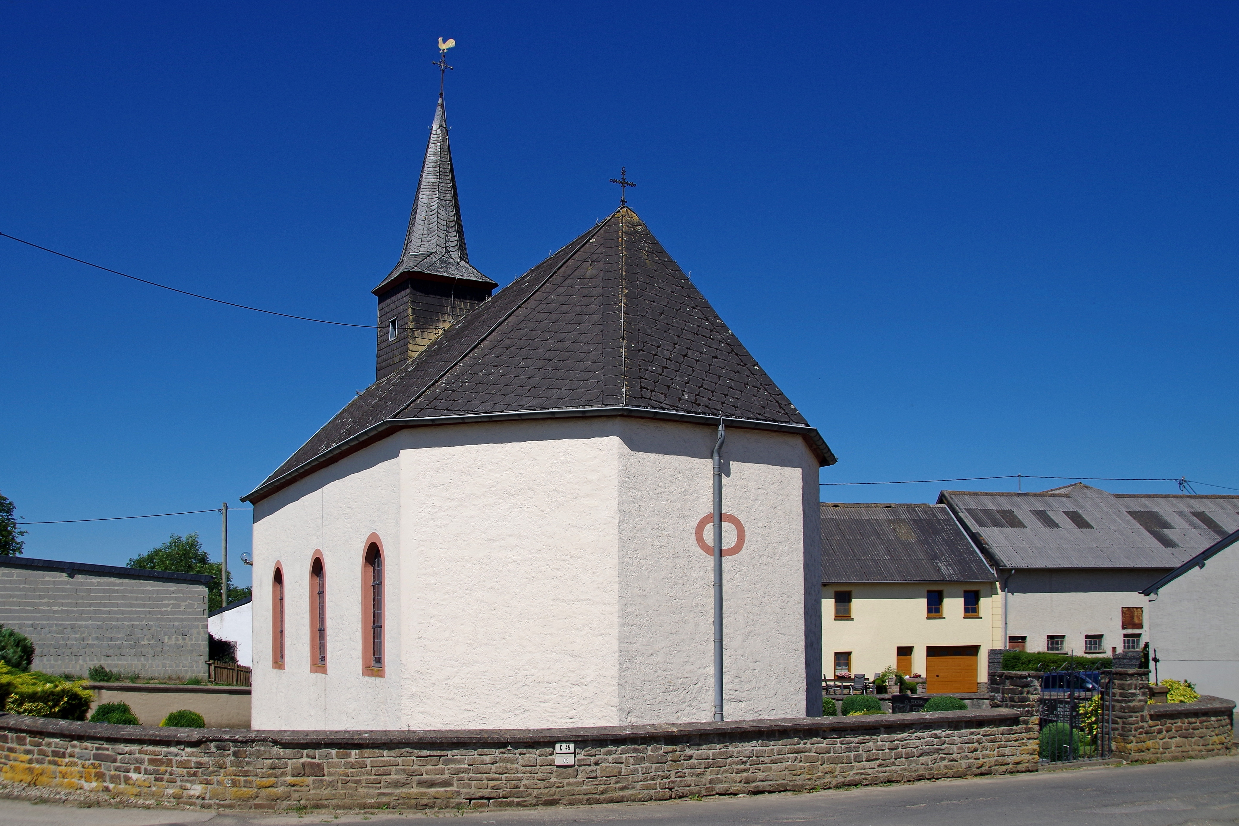 St. Peter (Scheitenkorb), Südostseite